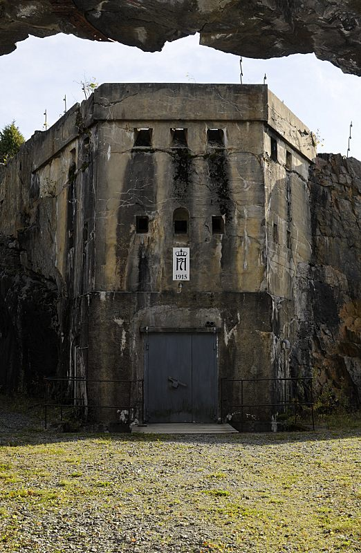 Inngangspartiet til indre fortsområde på Høytorp fort